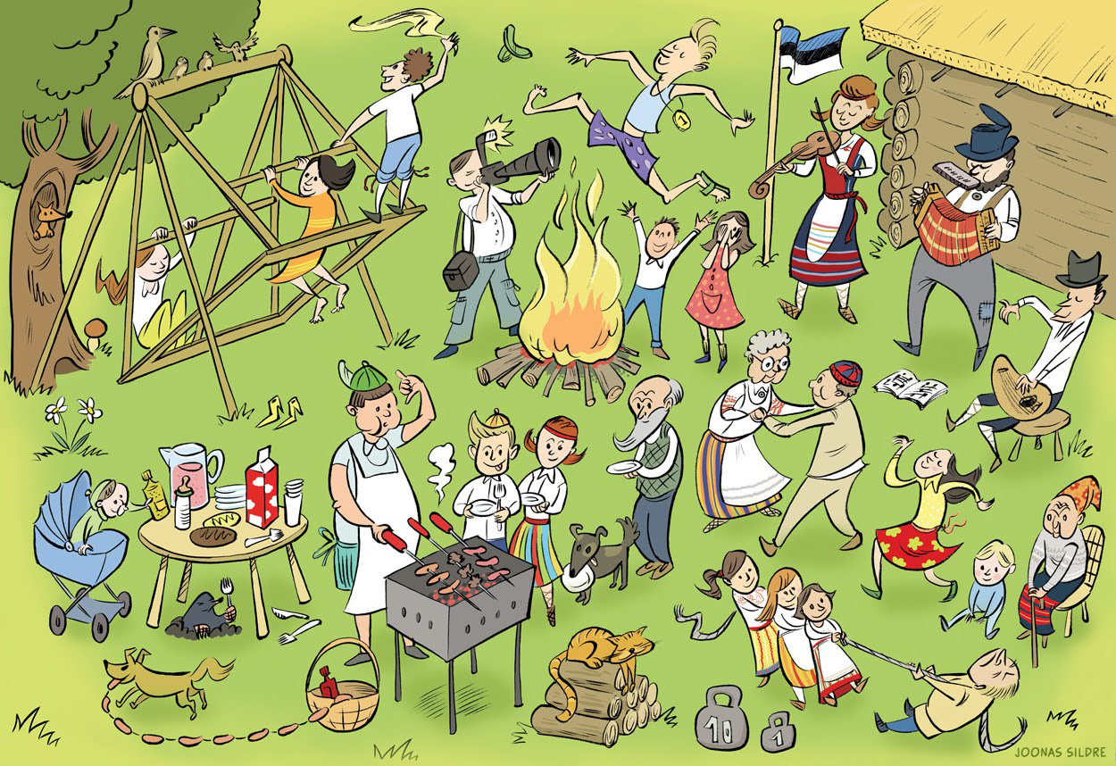 Eesti jaanipäeva kombed - grillimine, kiikumine, rahvapillid, seltskonnapängud, lõke ja üle lõkke hüppamine.